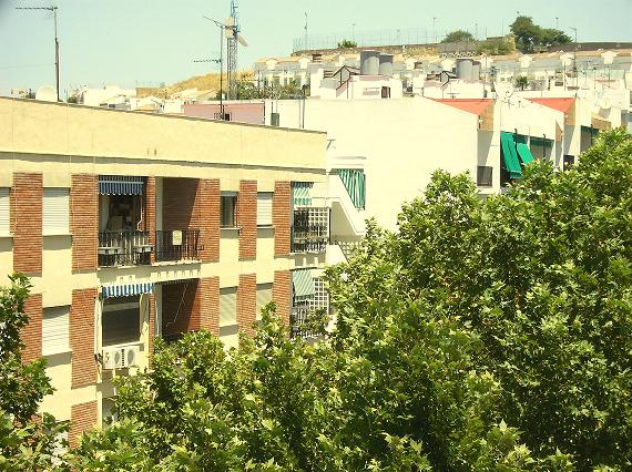 La avenida de la Feria desde un balcón